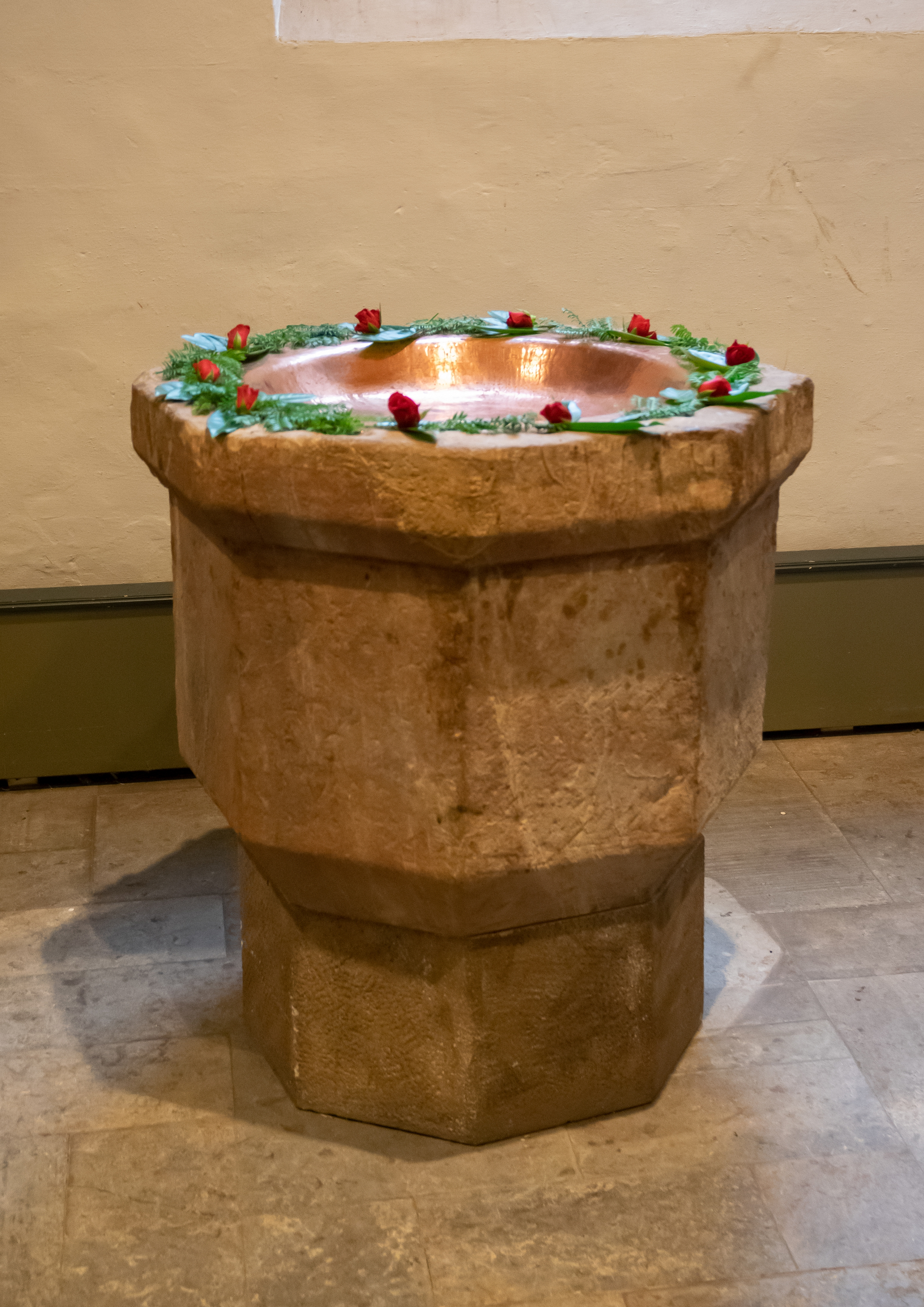 Evangelisch-reformierte Kirche in Stapellage, Lage (Lippe); Taufstein